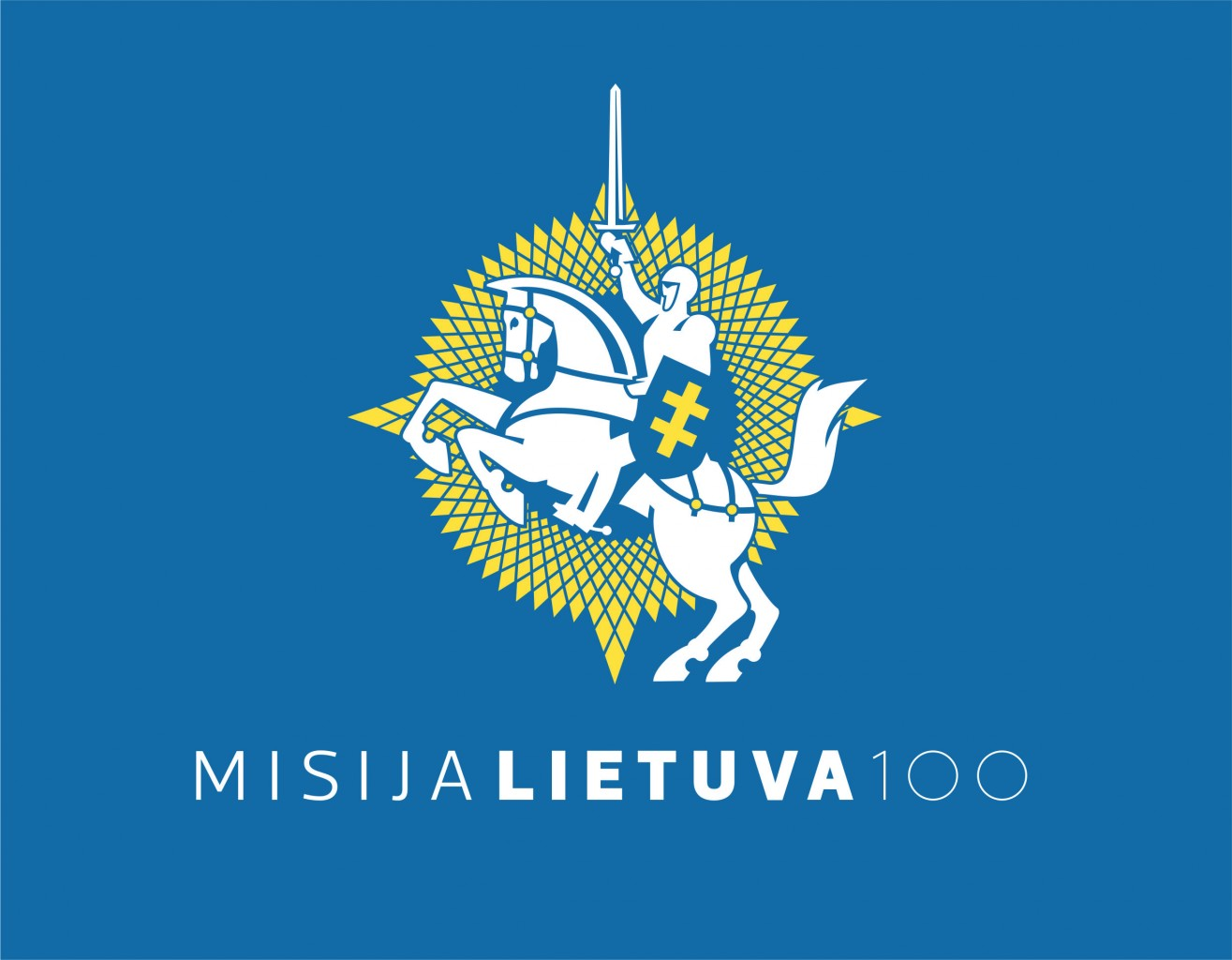 Misija Lietuva 100 ženklas Vytis. (aut. Tautvydas Kaltenis)